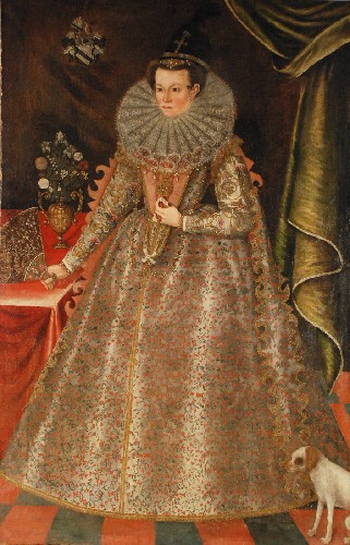 Kakas István erdélyi diplomata és keleti utazó felesége. Habsburg–Lotaringiai Mária Krisztina főhercegnő udvarhölgye.